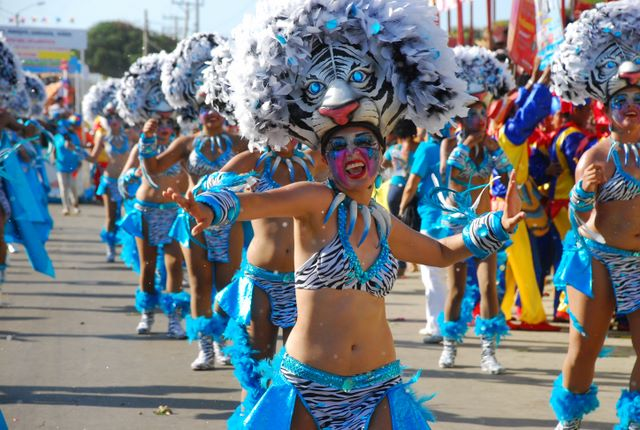 Comparsa del Carnaval de Barranquilla